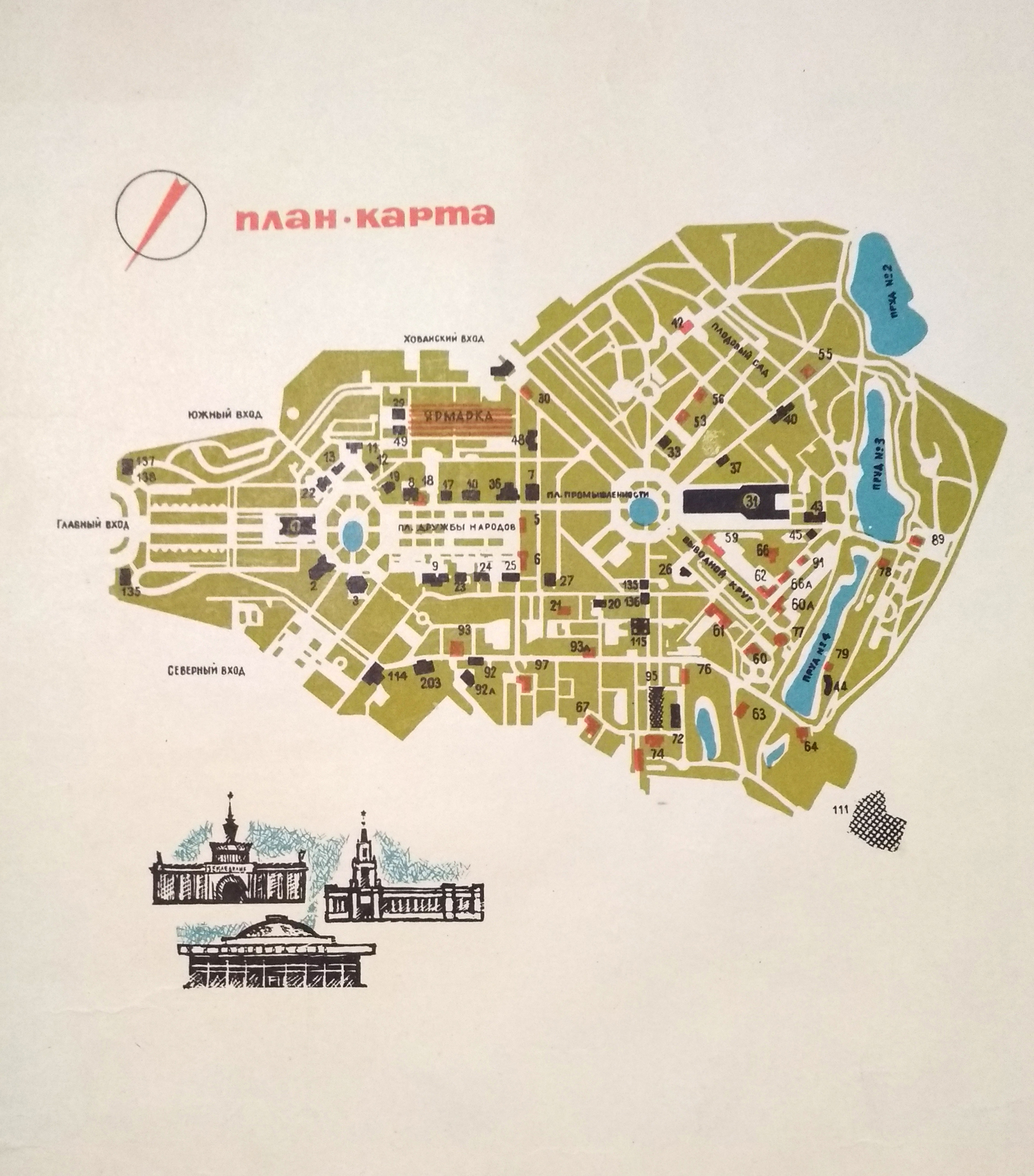 Художник Анатолий Викторович Борисов (1933–1969). План-карта ВДНХ СССР. Фрагмент. 1966. Павильоны в стилистике художественных почтовых конвертов. Собрание Михаила Тренихина